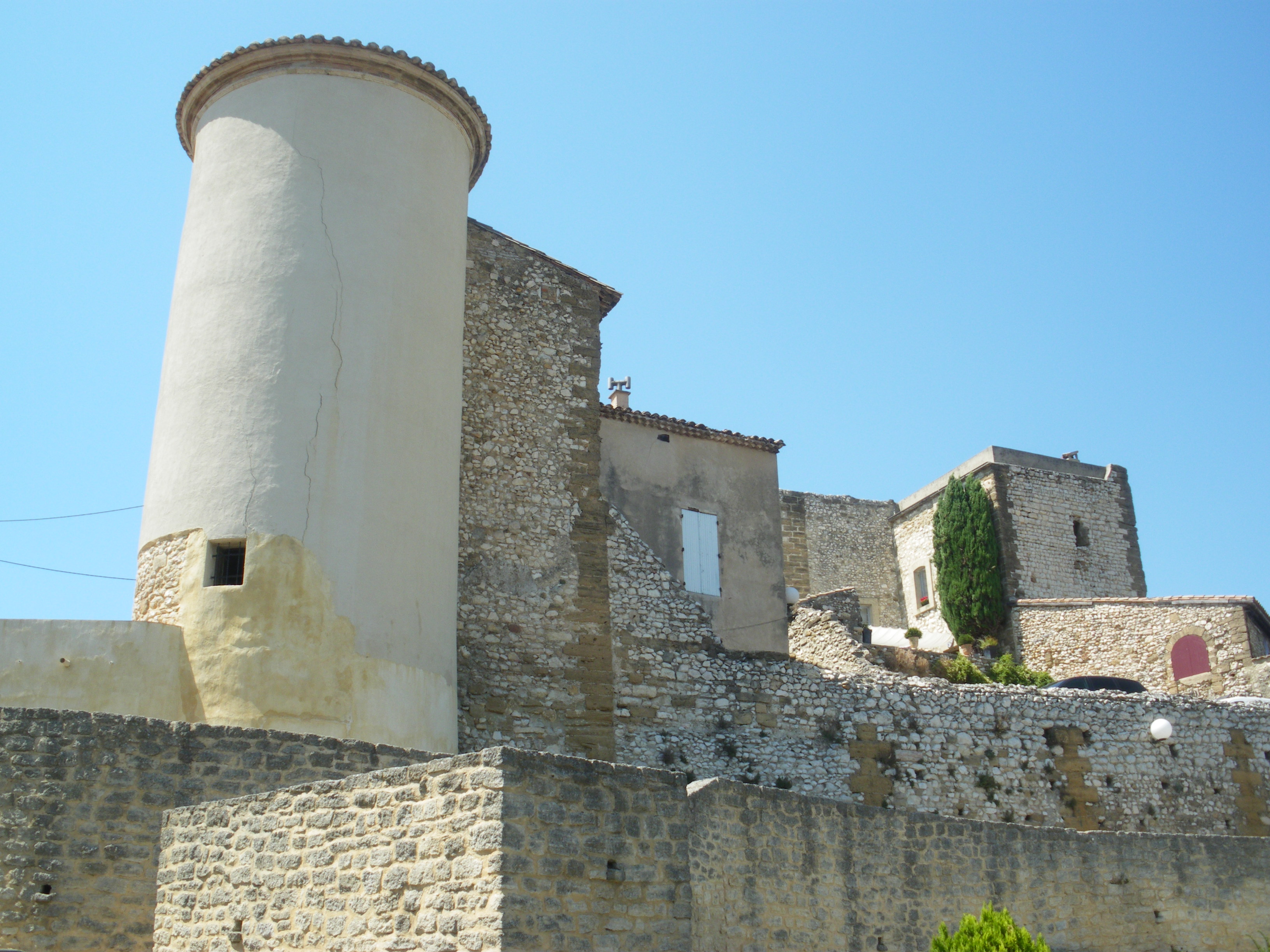 Chateau de Vedène, Vaucluse, France